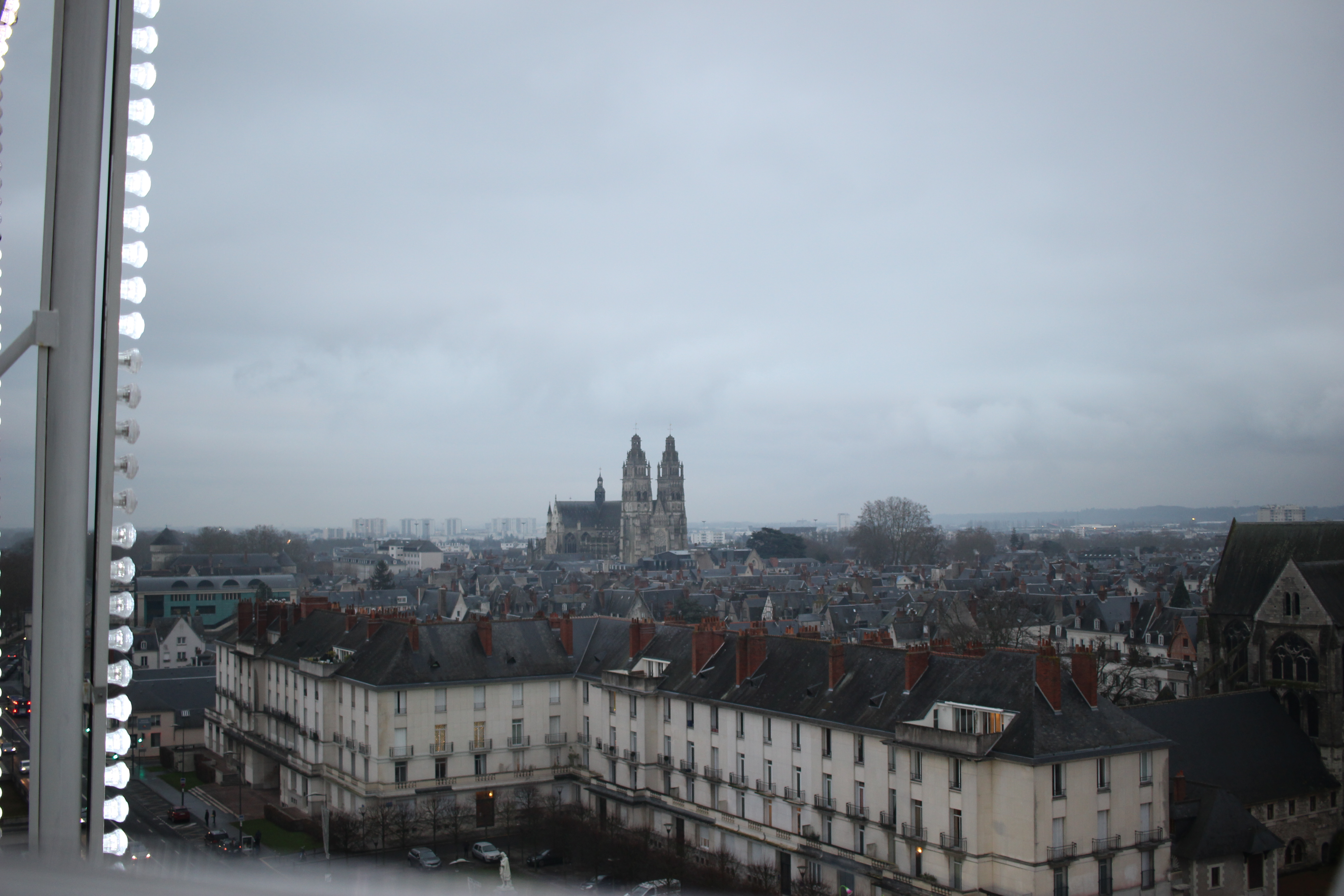 Vue depuis la grande roue de Tours, en décembre 2017. Cathédrale saint Gatien dans le fond.